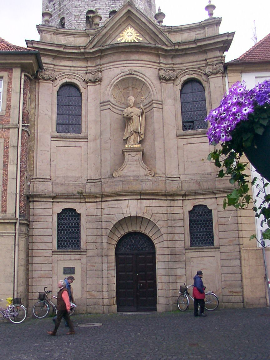 Paderborn: katholische Gaukirche zum heiligen Ulrich 1746 bis 1749 durch Hofbaumeister Franz Christoph Nagel errichtete Barockfassade